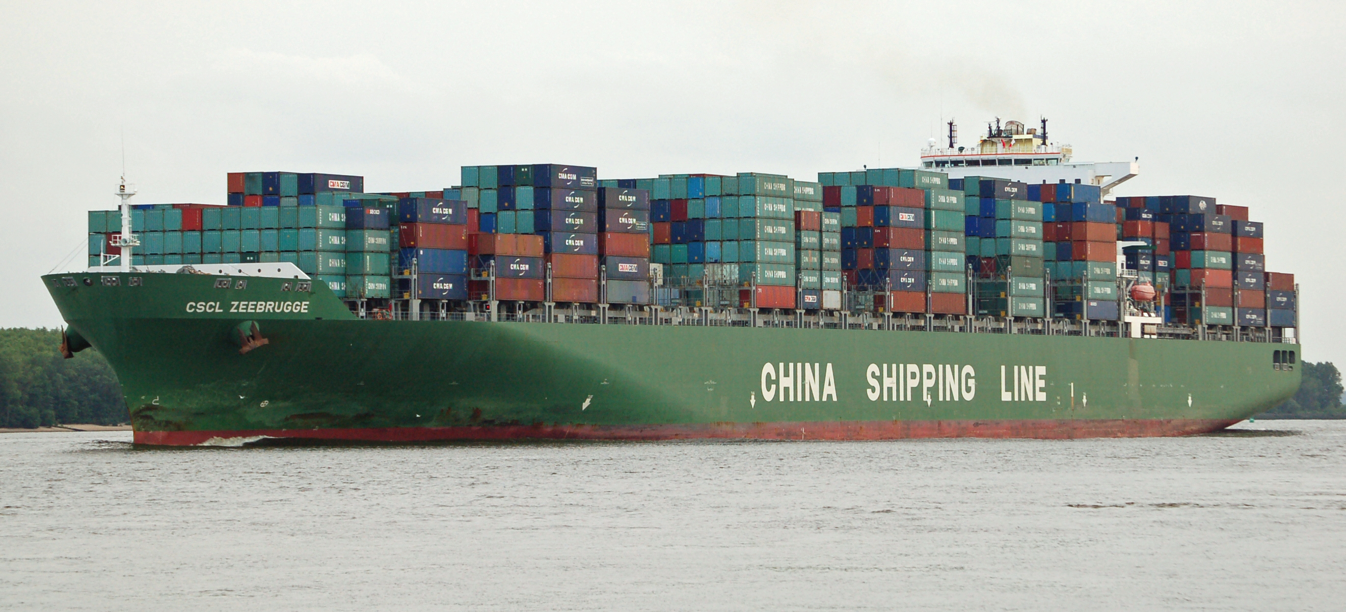 Das Containerschiff CSCL Zeebrugge auf der Elbe IMO-Nummer: 9314234 MMSI-Nummer: 477690700 Rufzeichen: VRCS2 Länge: 337.om Breite: 46.0m Flagge: Hong Kong